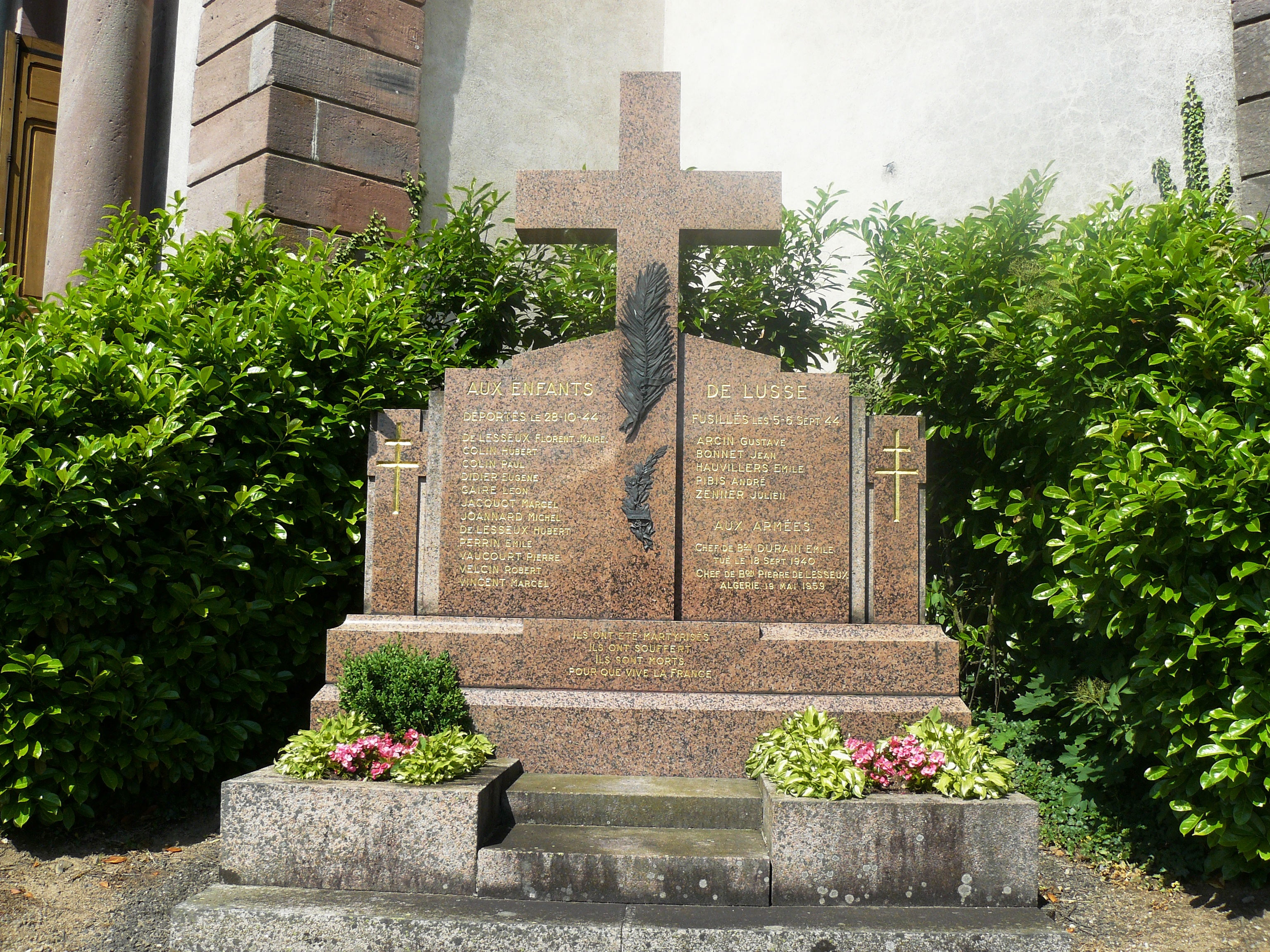 Le monument aux morts de Lusse